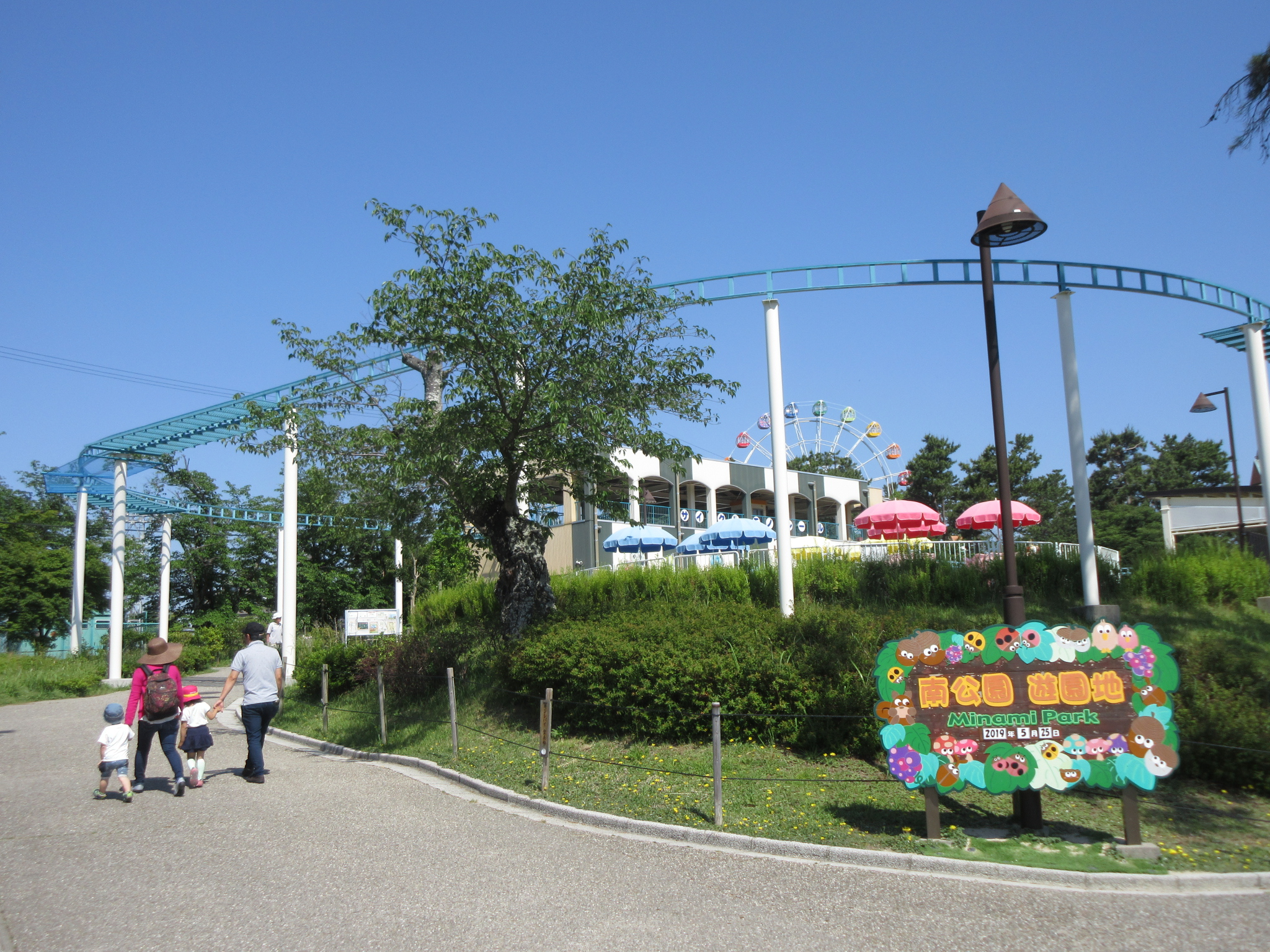 南公園（岡崎市若松町）